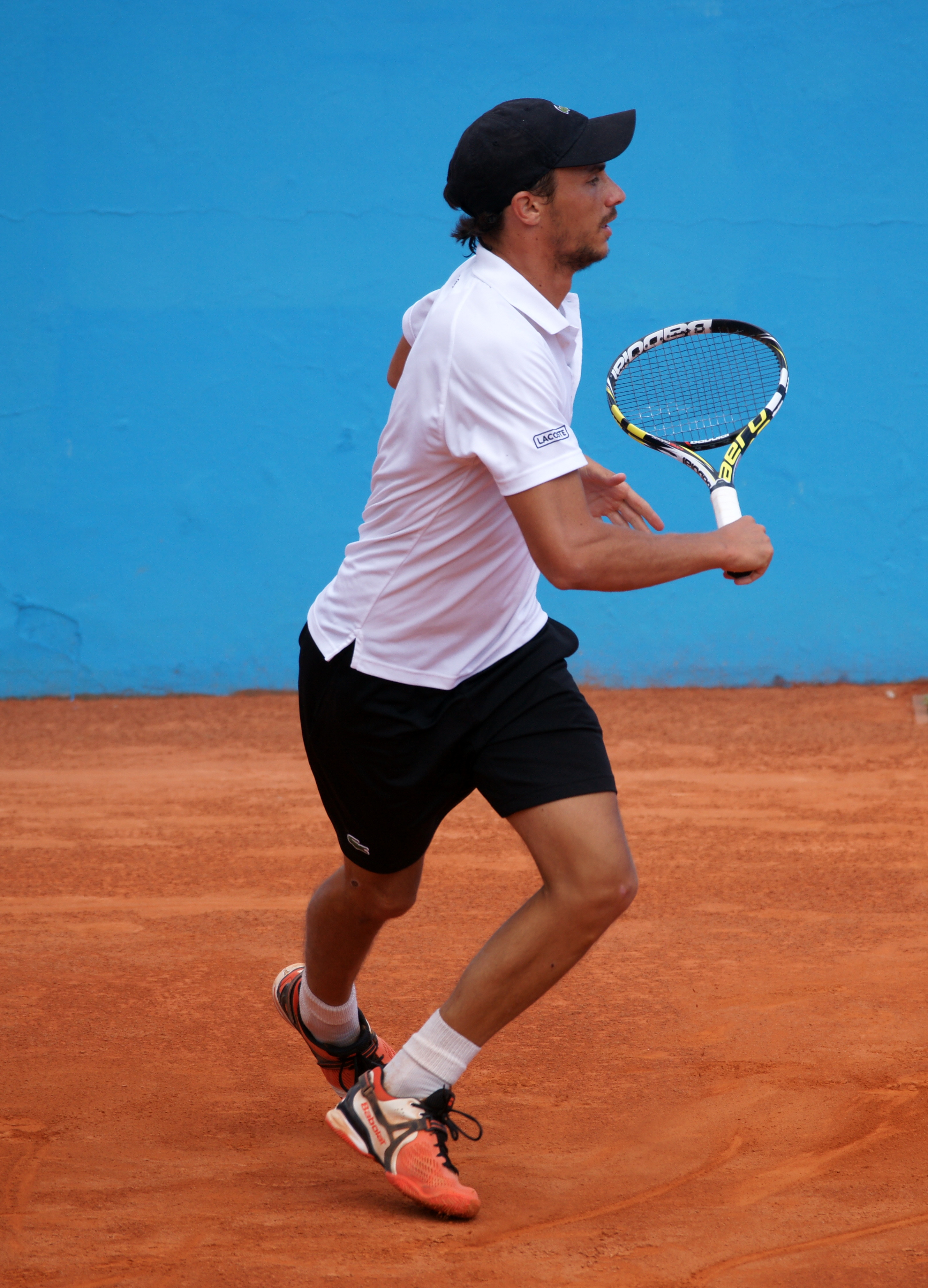 Martin Vaisse Nice Open ATP 2014